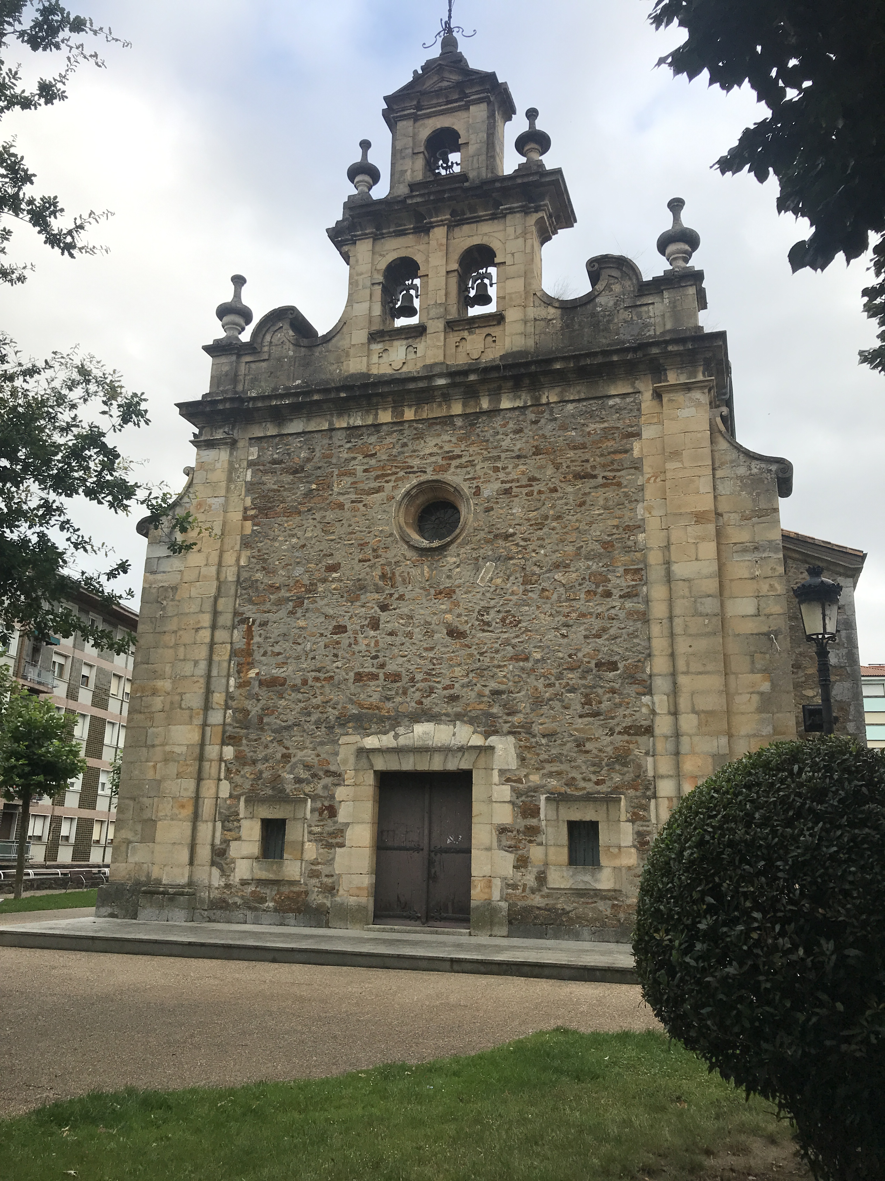 Ermita de Nuestra Señora de Udiarraga en Ugao-Miraballes, Bizkaia, País Vasco (España)